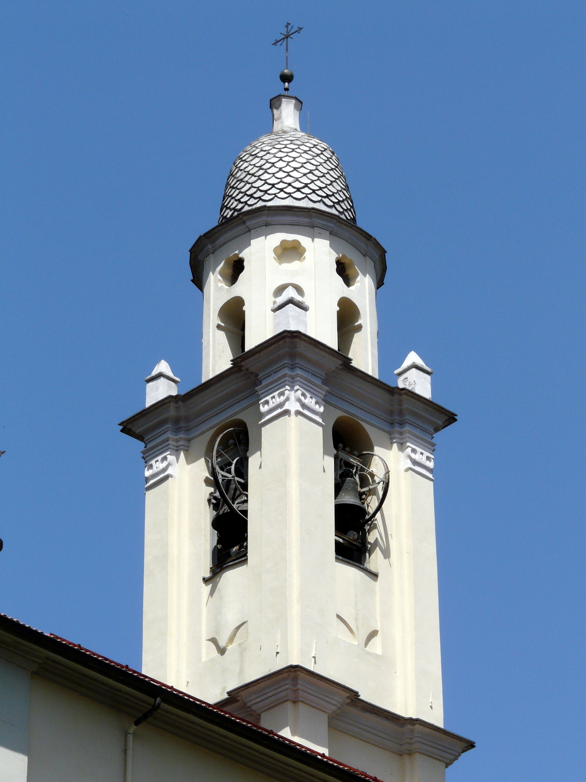 Il campanile della chiesa di Santa Caterina da Siena, Gorreto, Liguria, Italia